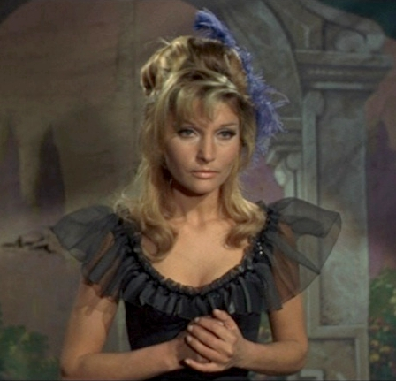 L'attrice Nuccia Cardinali sul set de Due croci a Danger Pass (1967)